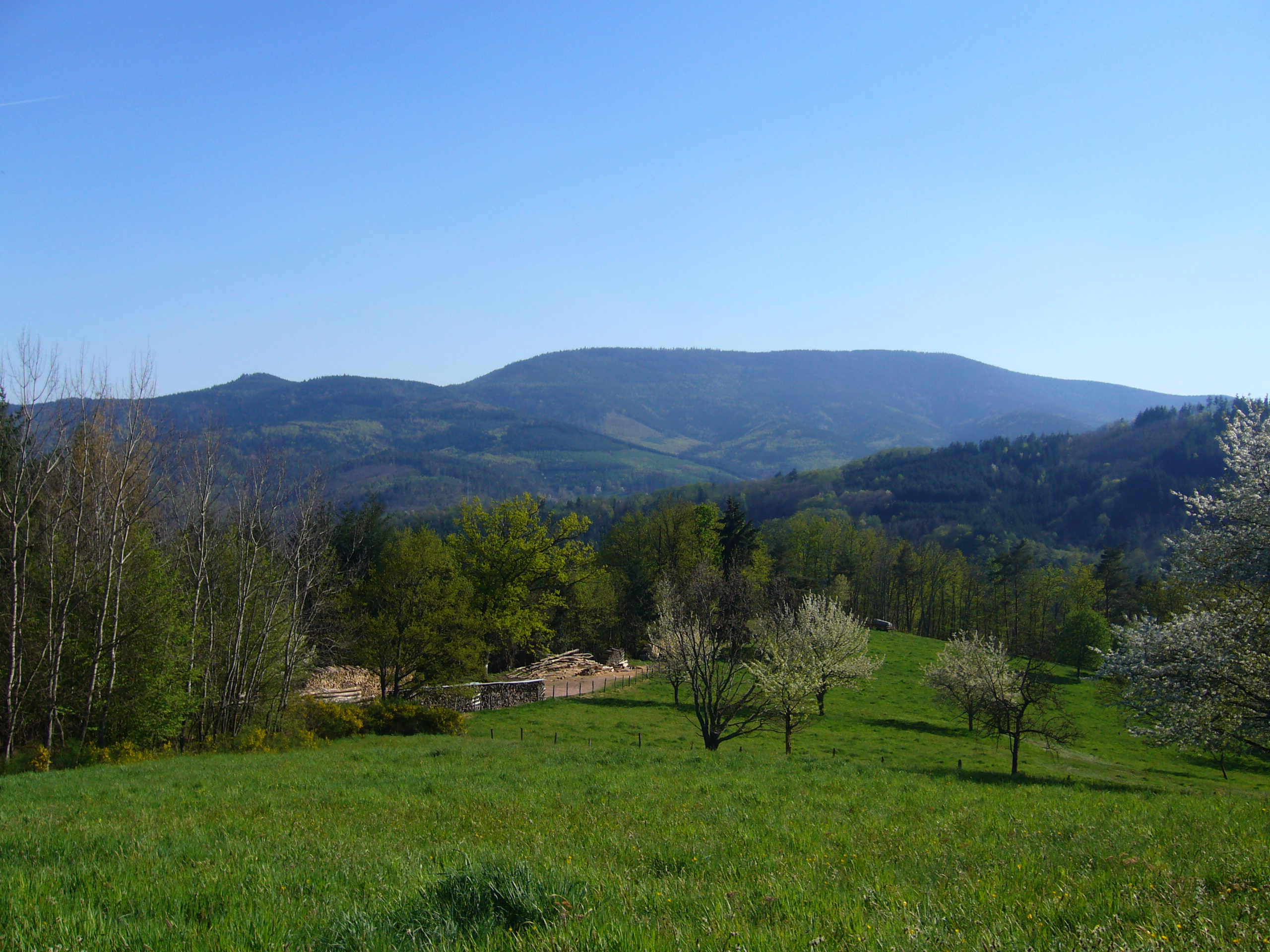 Rombach-le-Franc - Le Cheval Poirier et au fond le massif du Taennchel